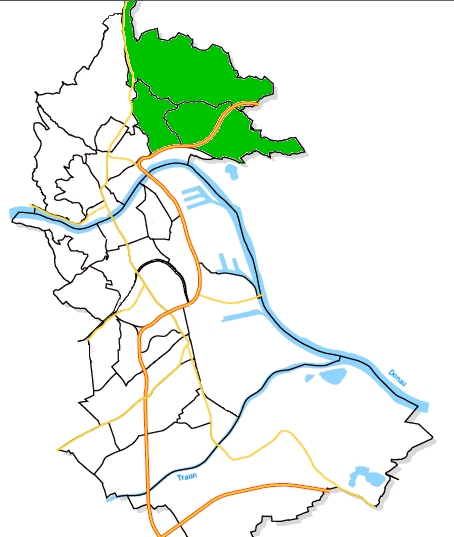 Städtische Bezirke Linz - St. Magdalena hervorgehoben. Selbst gezeichnet auf Grundlage von: "Stadtforschung Linz: Linz 2000. Fakten, Bilder, Grafiken." (der greg:) 12.3.2006 - Lizenz: CC-BY 2.0